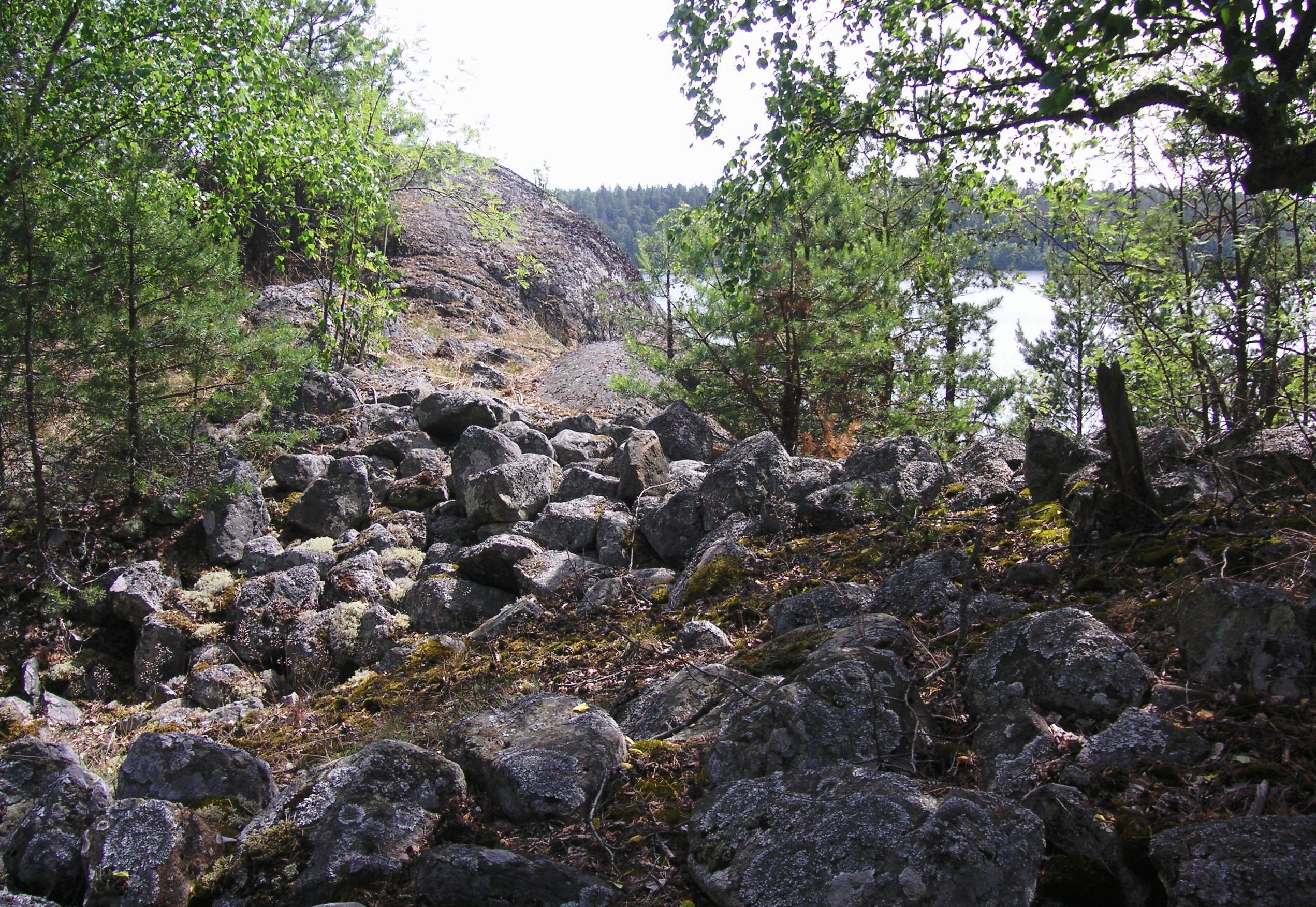 Lovön fornborg vid Kohagen intill Malmviken